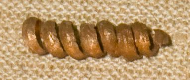 Спиралька, бронза. (VIII-IX век). Археологические раскопки 1970ых годов, городище Камно, Псковская область. Государственный музей истории Санкт-Петербурга. Бронзовая стружка?